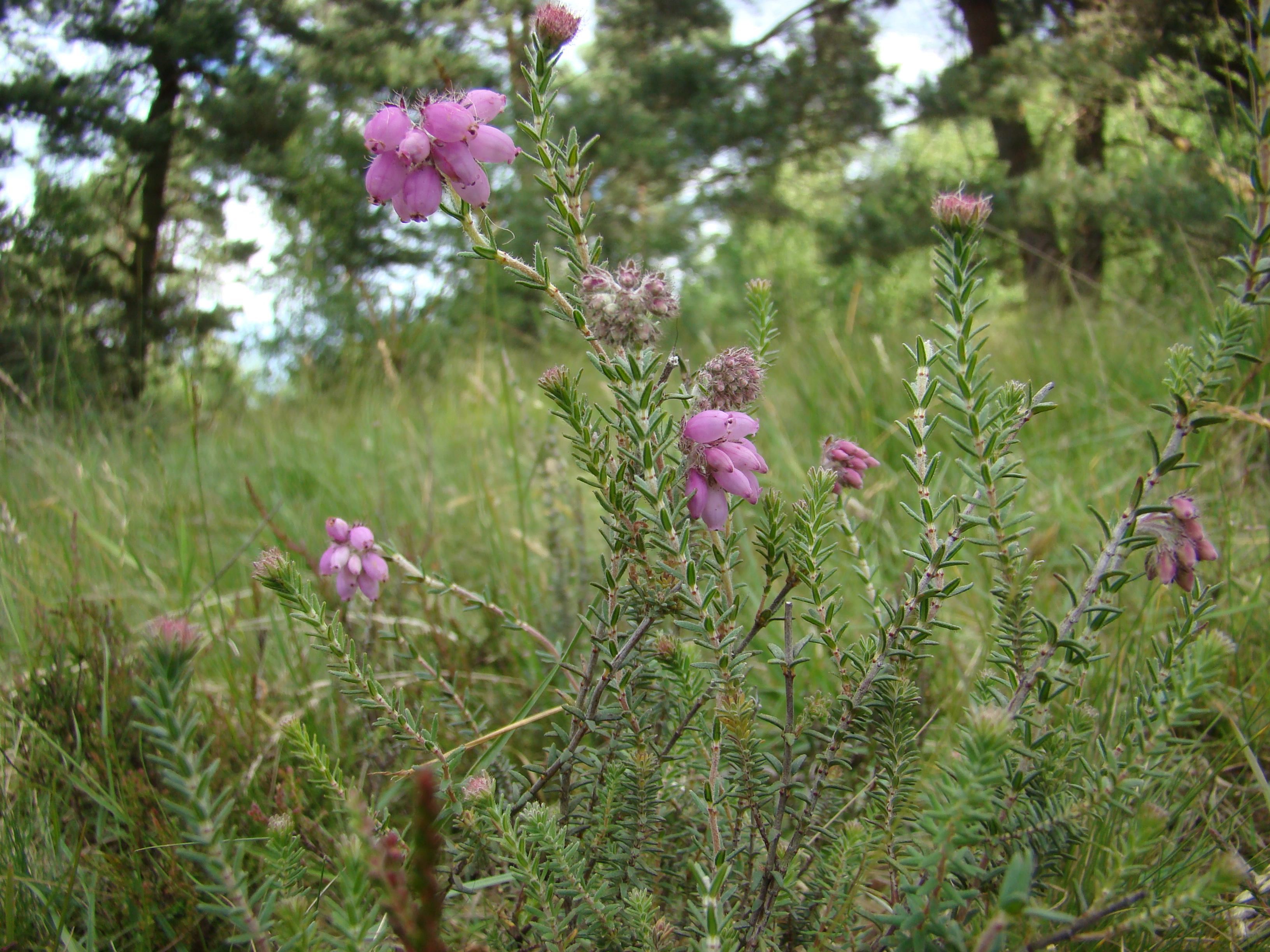 Glockenheide Erica Tetralix, Standort Lüneburger Heide, Niedersachsen, Germany